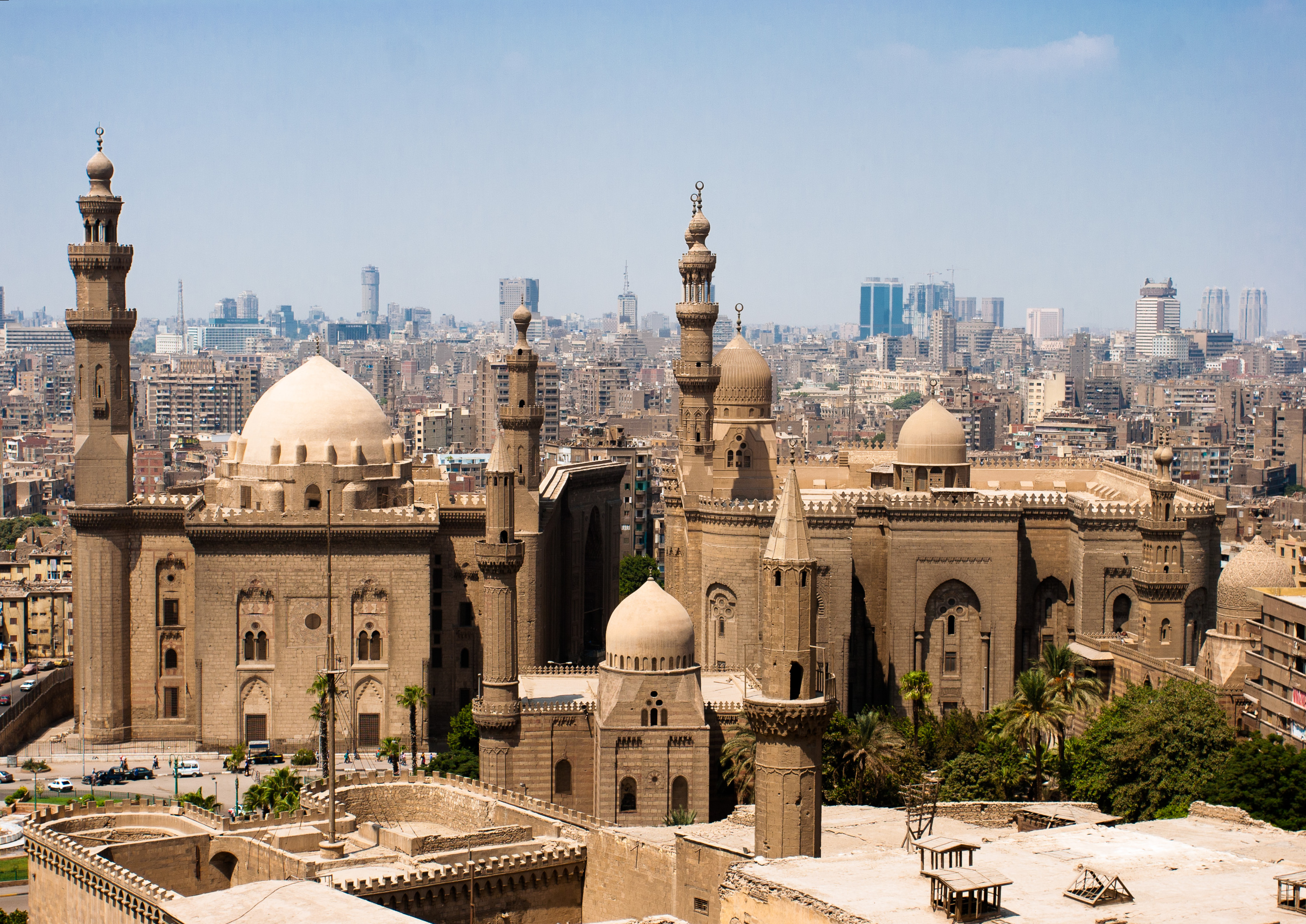 Rifai Mosque and Sultan Hassan mosque